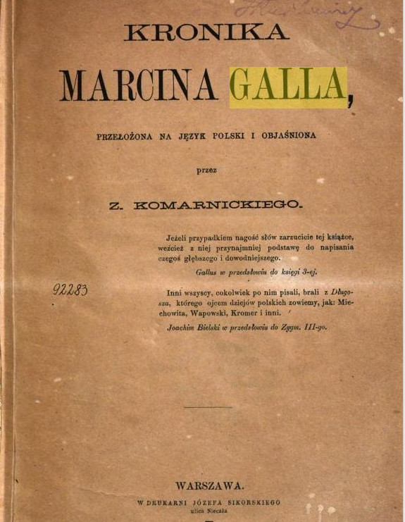 Okładka drugiego polskiego tłumaczenia Kroniki Galla Anonima pióra Zygmunta Komarnickiego, wydanego w 1873 roku.